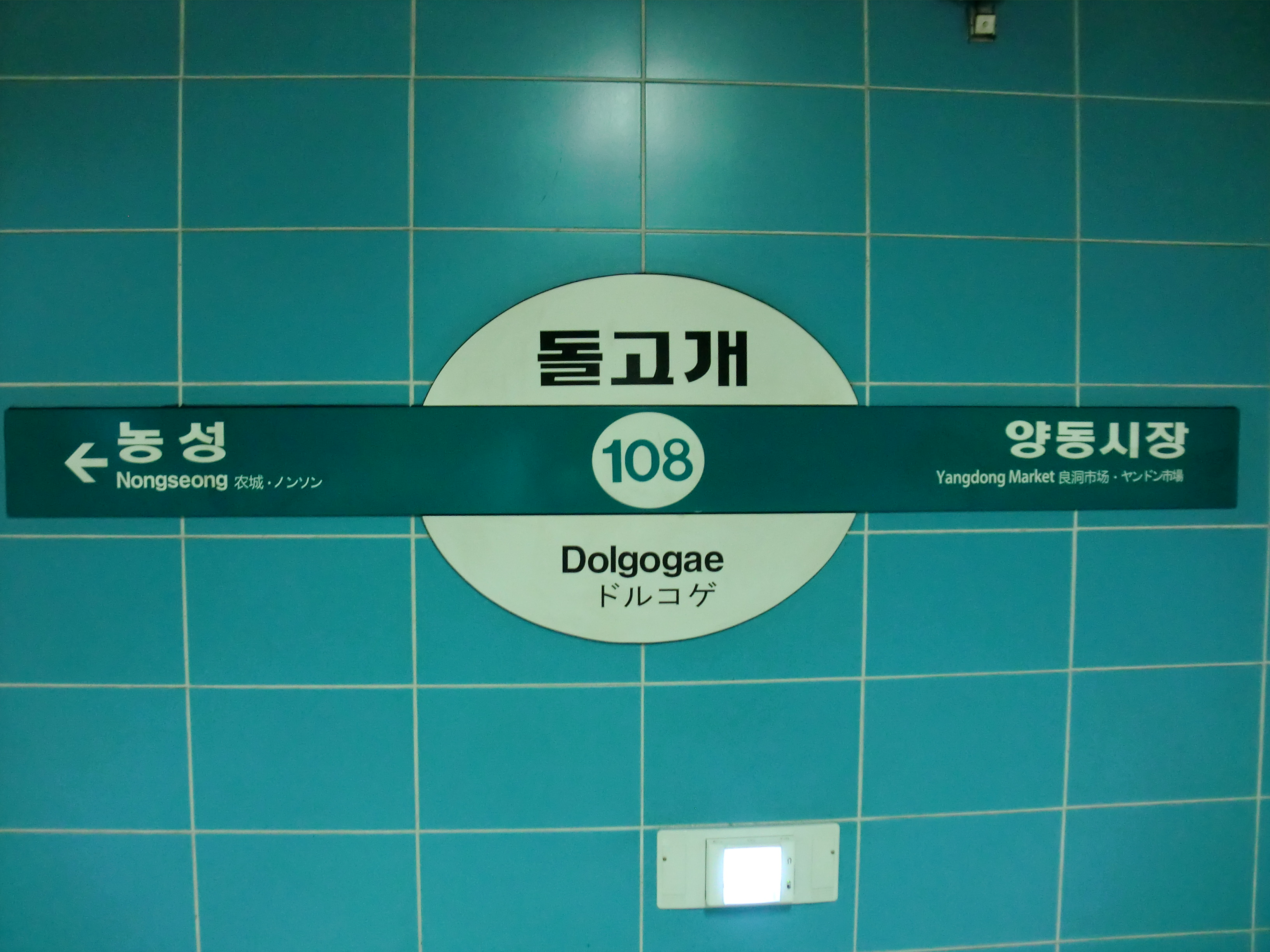 광주도시철도 1호선 돌고개역 역명판